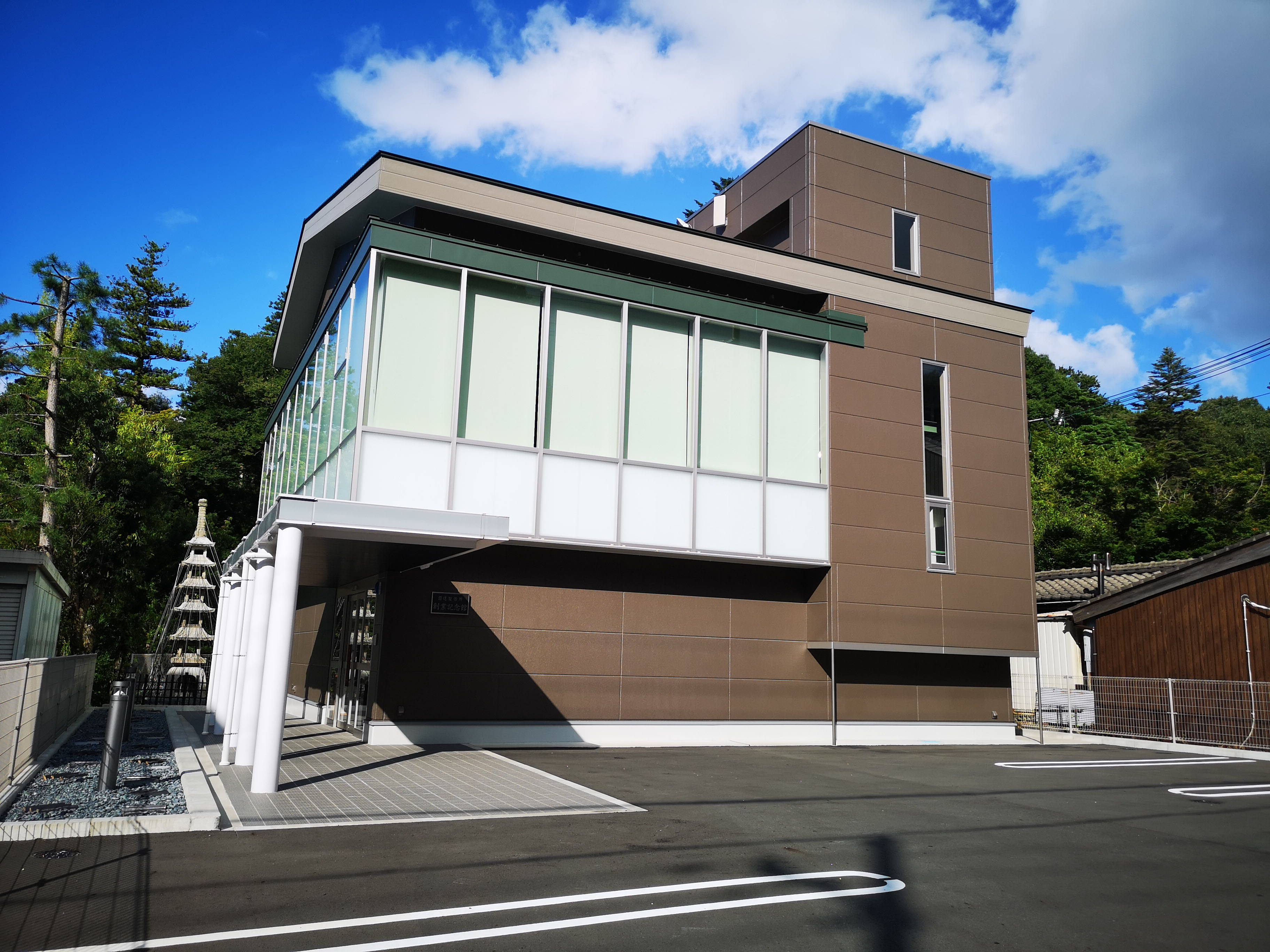 京丹後市峰山町に所在する、日進製作所の創業記念館。